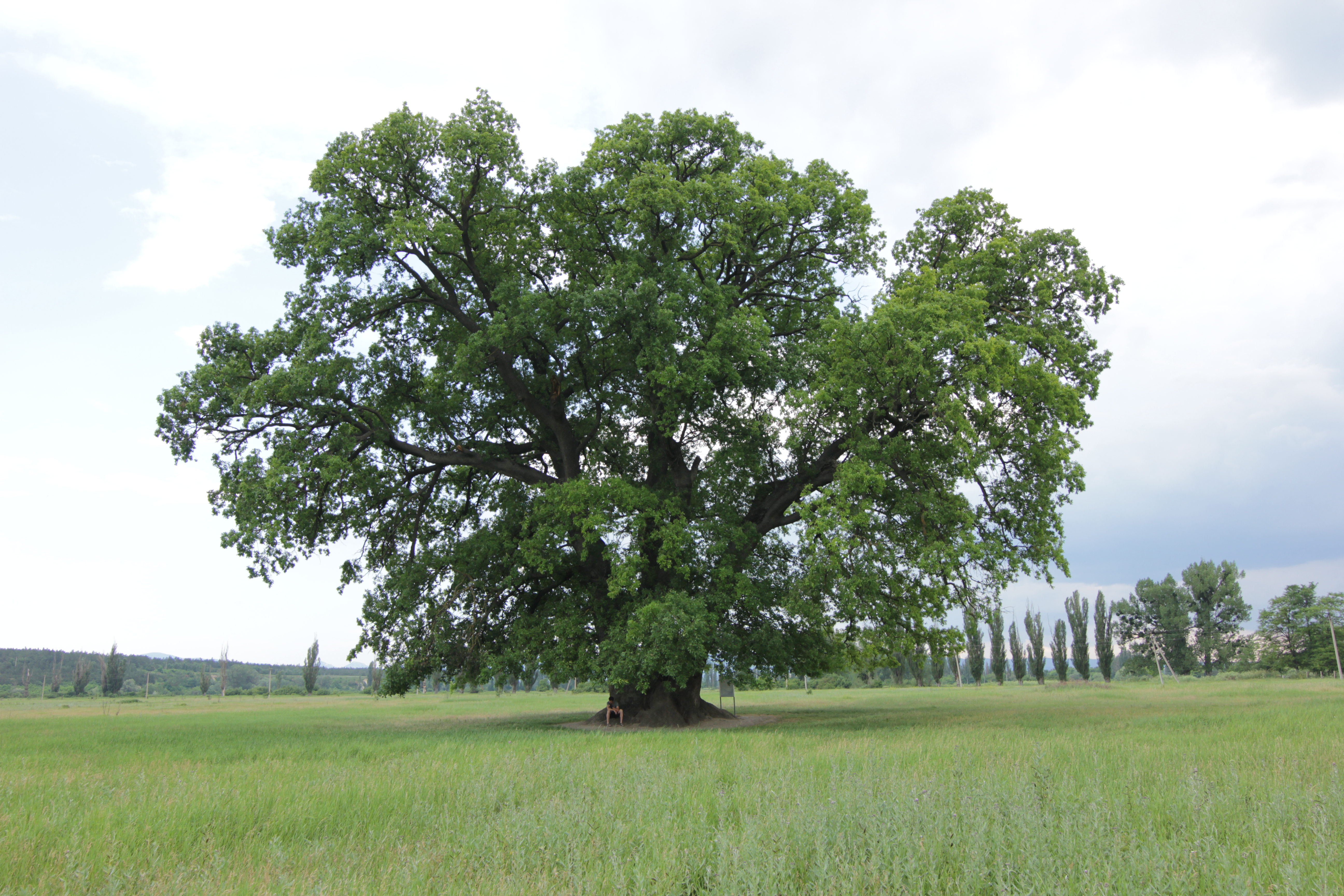 Суворовский дуб: в восточной части села, с. Яблочное, Белогорский район, Крым This object is located on the Crimean Peninsula and recognized as a protected area by both Russia and Ukraine under the ID: 8210075 / 01-207-5009, respectively. The legal status of the Crimean region is currently disputed.